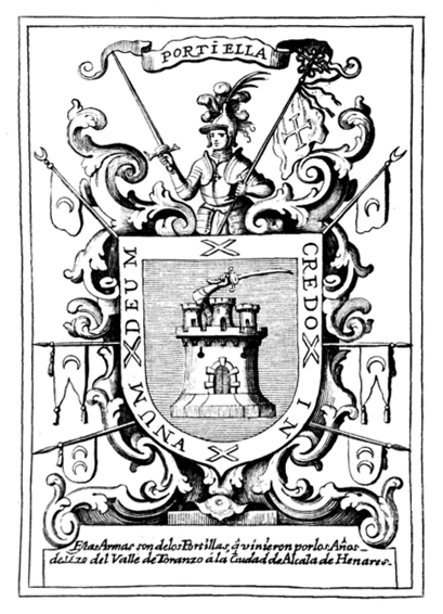 Escudo de armas de la familia "Portiella" o "Portilla". Alrededor de un torreón almenado presenta la inscripción latina: CREDO IN UNUM DEUM (expresión ritual que forma parte del ceremonial según las reglas del misal romano). En la parte inferior, describe en español el origen de esta familia: "Estas armas son de los Portillas, que vinieron por los años de____ del Valle de Toranzo a la ciudad de Alcalá de Henares".